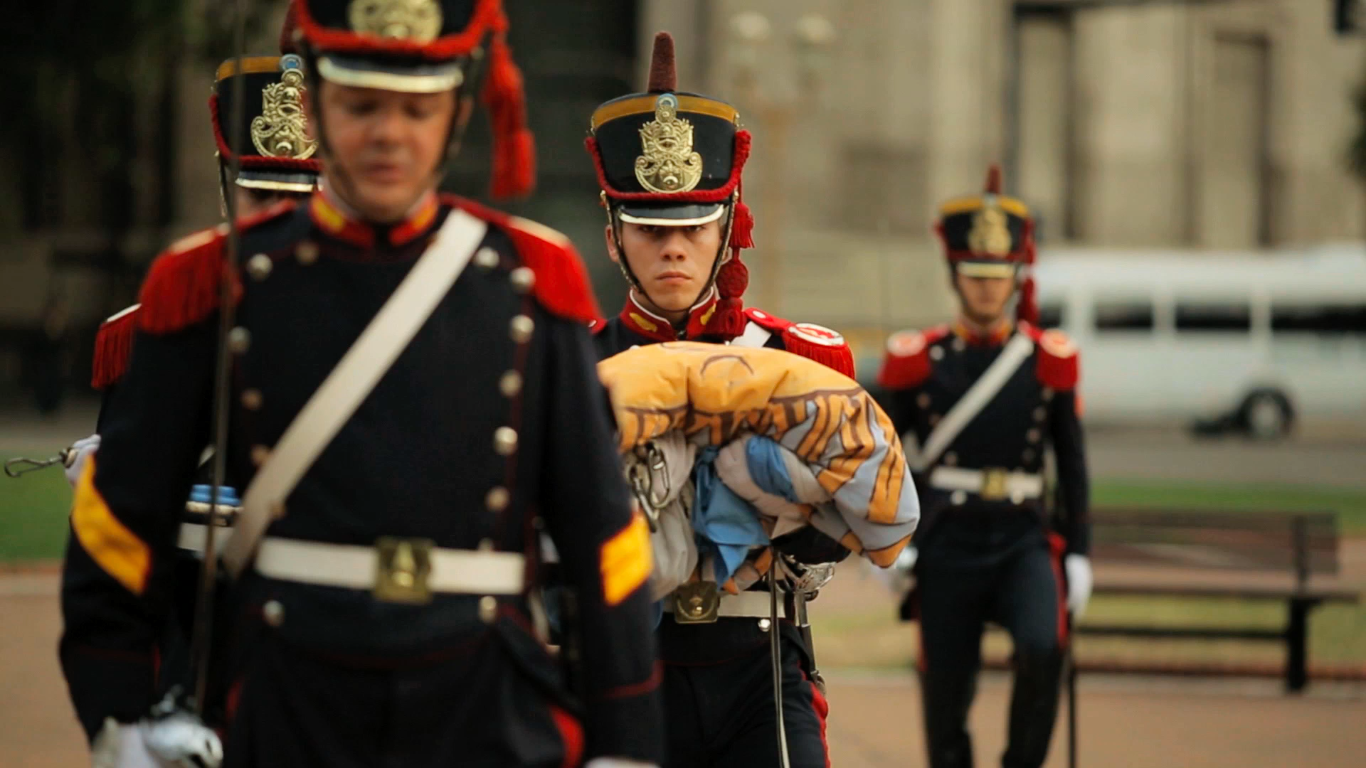 Granadero con la bandera argentina.